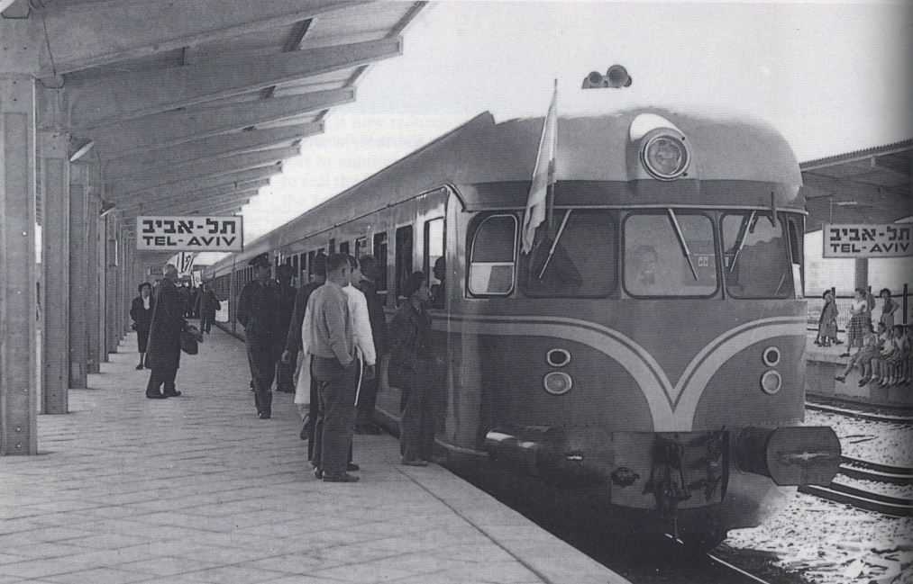 מערך קרונועי אסלינגן בתחנת ת"א מרכז